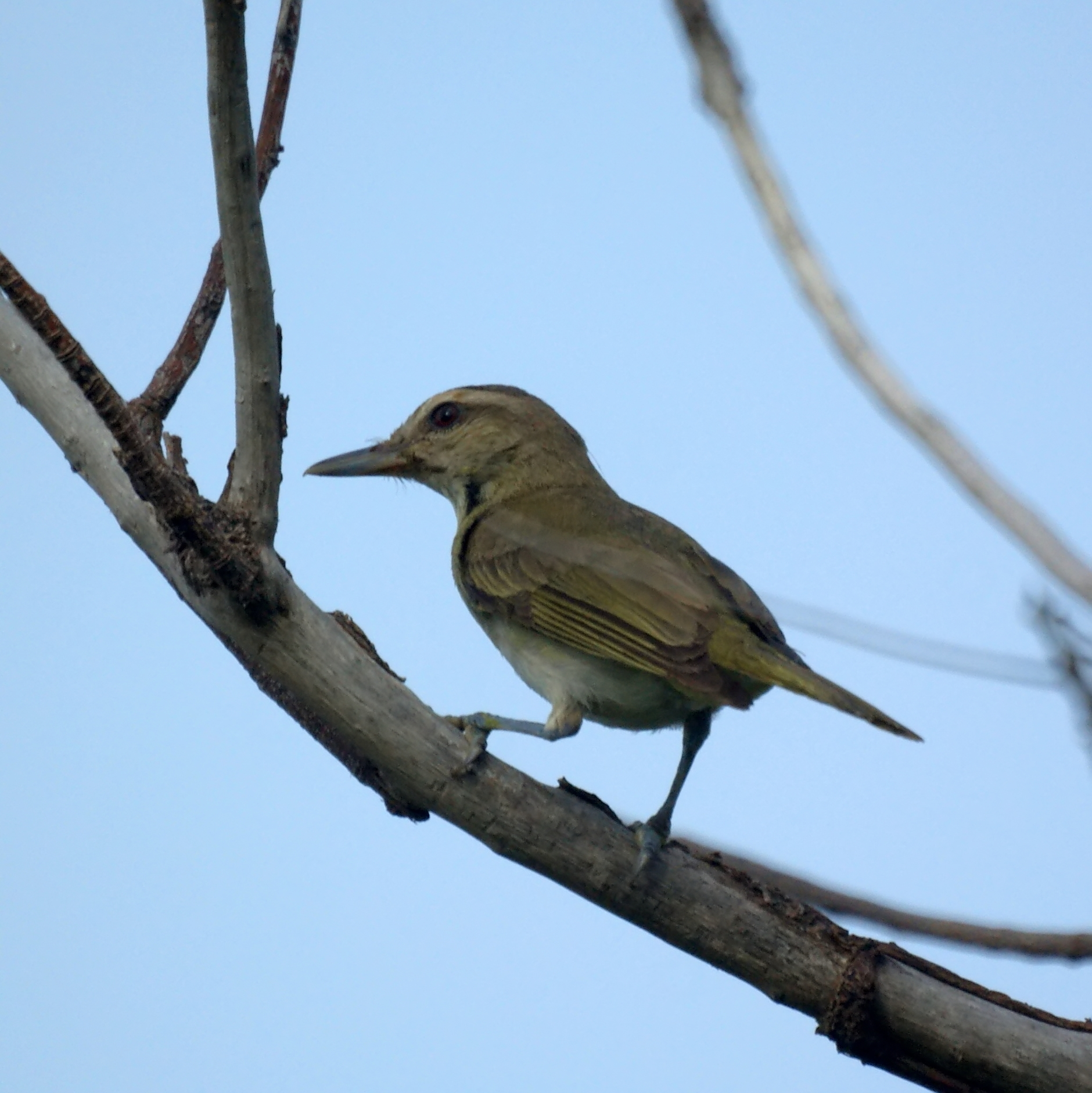 Black-Whiskered Vireo